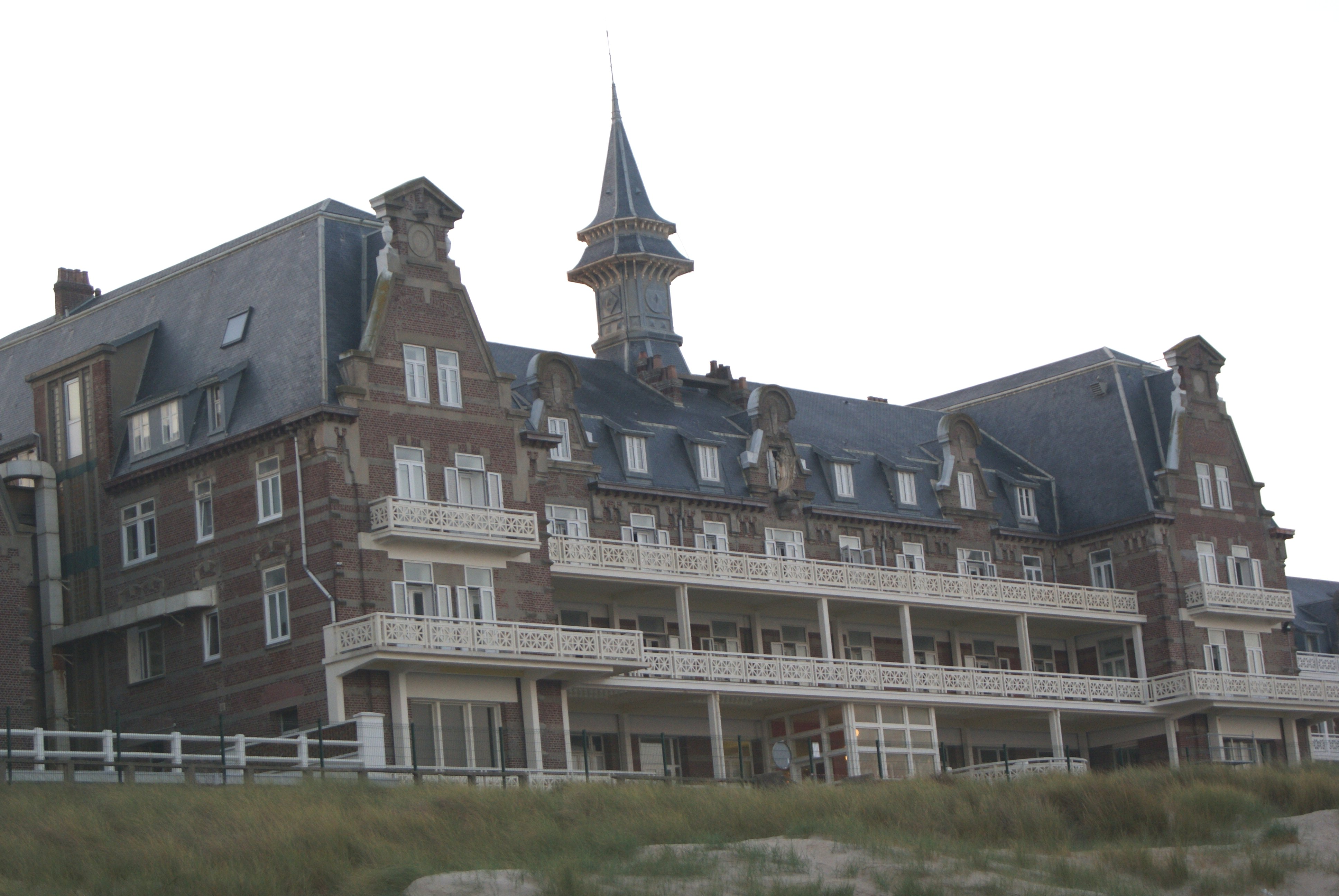 Institut Calot